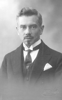 Harald Perlitz